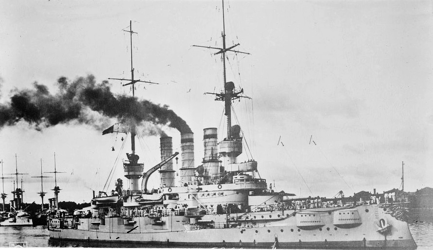 The German Imperial Navy Deutschland-class battleship SMS Schlesien.